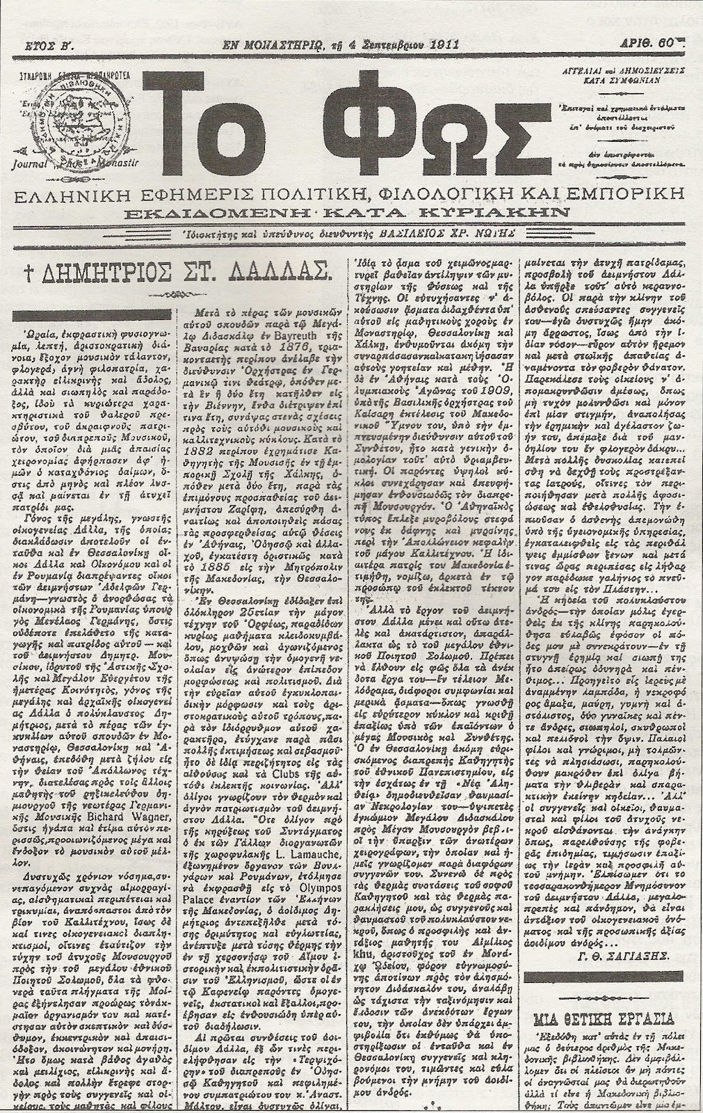 Главата на вестник "Фос".